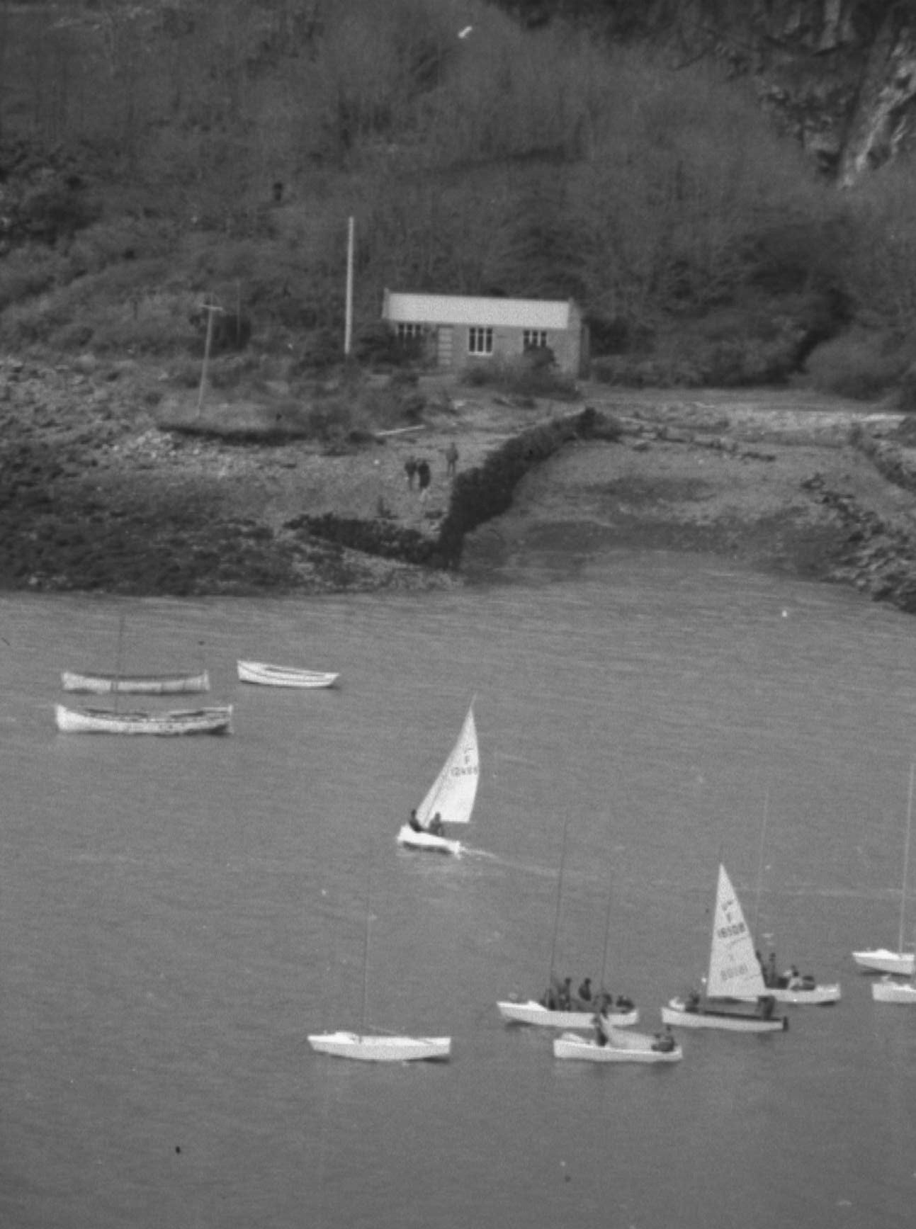 Centre nautique, vauriens et caravelles.jpg